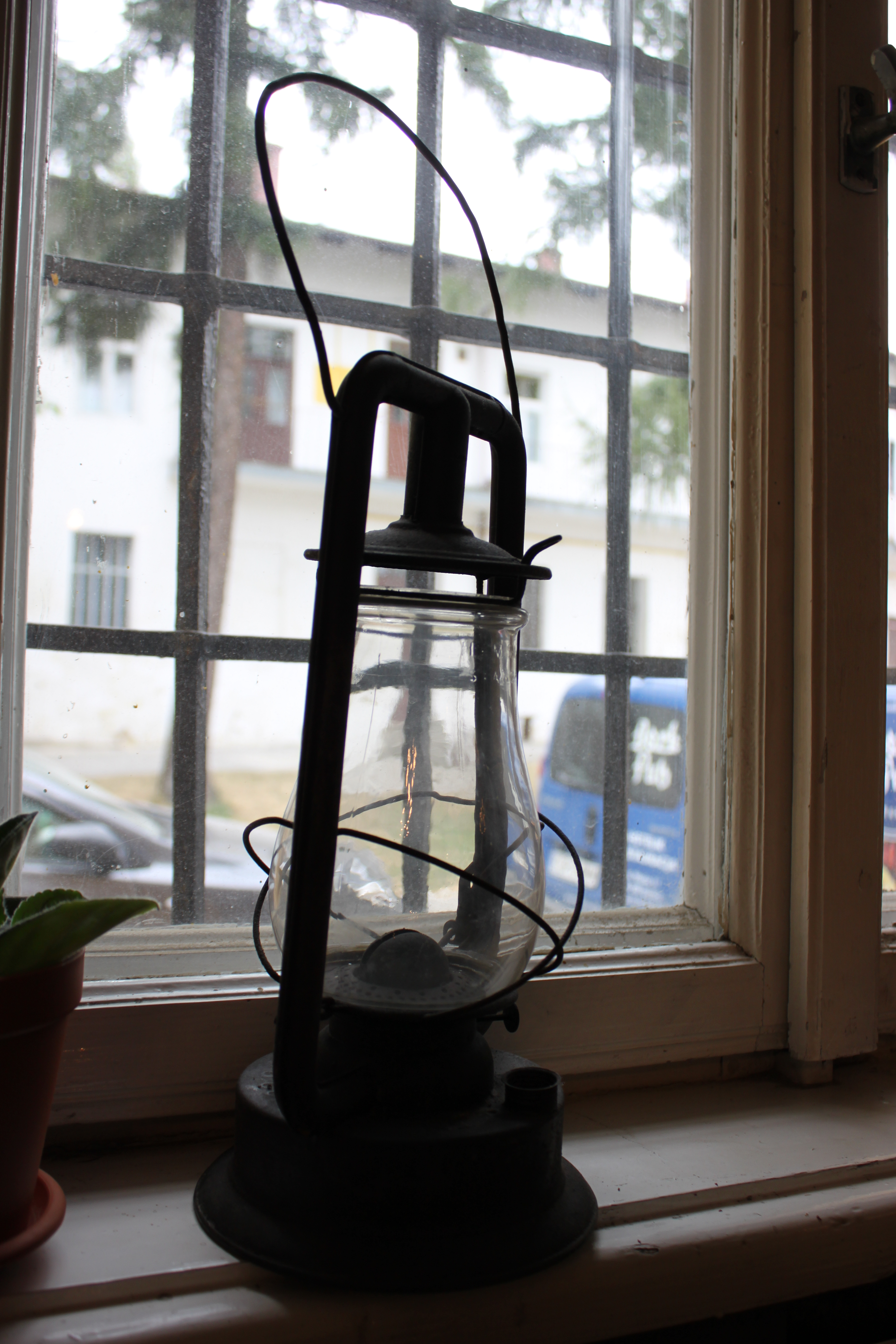 fot. J. Nowostawska-Gyalókay, Małopolski Instyutut Kultury, 2013